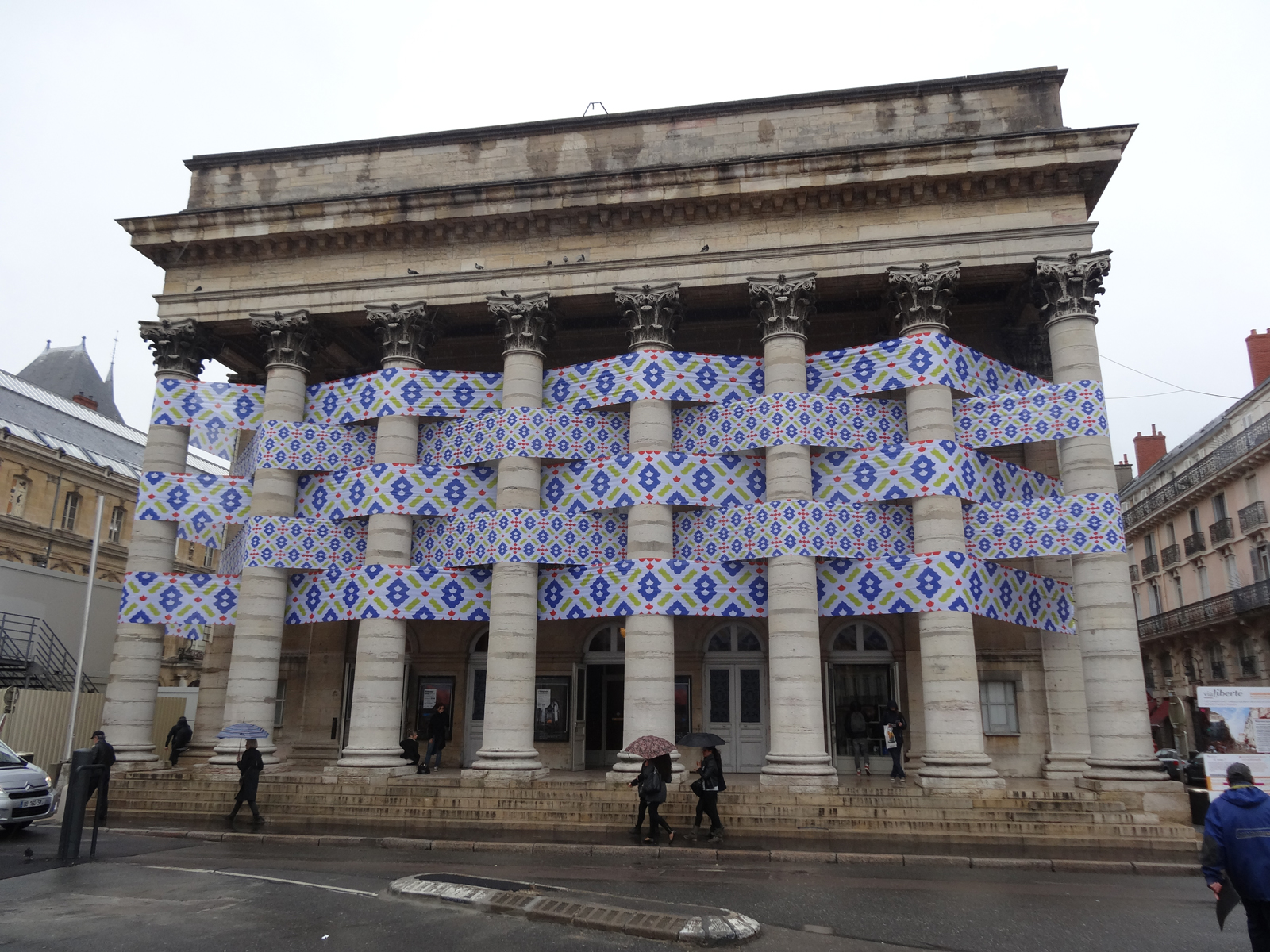 Temporär verzierte Säulenfront des Grand Théâtre de Dijon